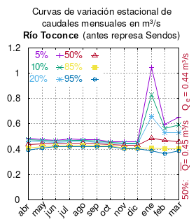 Curva de Variación Estacional Río Toconce antes represa Sendos. # cita publicación # | apellido = Dirección General de Aguas # | nombre = # | enlace-autor = Ministerio de Obras Públicas (Chile) # | título = Diagnóstico y clasificación de los cursos y cuerpos de agua según objetivos de calidad. Cuenca del río Loa # | ubicación = Santiago de Chile # | editorial = Ministerio de Obras Públicas (Chile) # | año = 2004 # | edición = # | url = # | ref = harv # # Tabla 4.9: Río Toconce antes represa Sendos (m3/s) pág. 51 mes 5% 10% 20% 50% 85% 95% abr 0.487 0.476 0.462 0.437 0.408 0.392 may 0.476 0.468 0.459 0.442 0.421 0.409 jun 0.468 0.463 0.456 0.444 0.428 0.419 jul 0.480 0.470 0.460 0.443 0.427 0.419 ago 0.475 0.469 0.462 0.448 0.431 0.420 sep 0.475 0.465 0.456 0.441 0.427 0.421 oct 0.459 0.455 0.449 0.439 0.427 0.419 nov 0.457 0.450 0.443 0.429 0.411 0.401 dic 0.457 0.450 0.443 0.429 0.411 0.401 ene 1.044 0.827 0.656 0.486 0.408 0.389 feb 0.598 0.566 0.530 0.468 0.401 0.366 mar 0.653 0.591 0.533 0.458 0.406 0.389